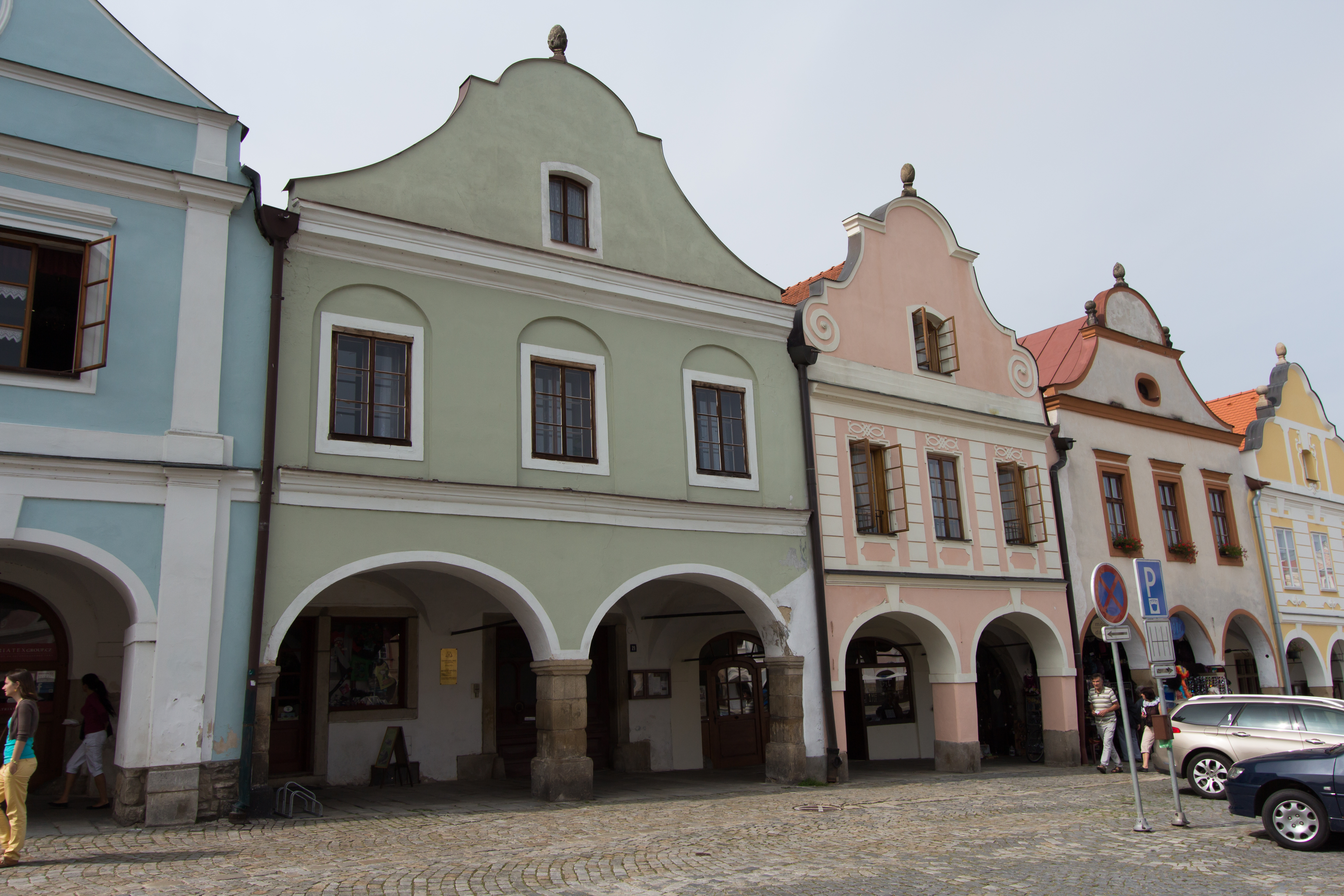 Dům čp. 21, náměstí Zachariáše z Hradce 21, Telč-Vnitřní Město, Telč.